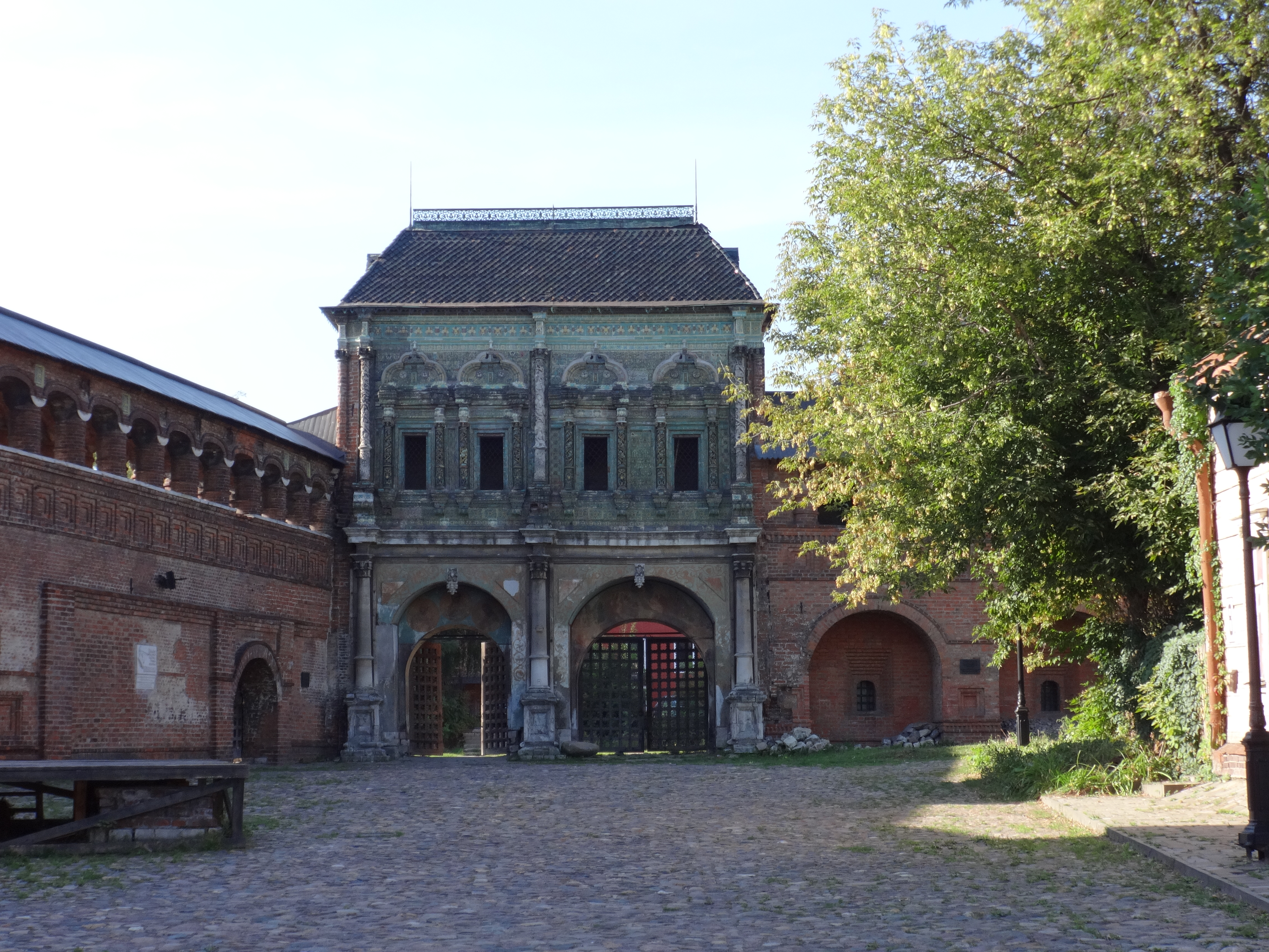 Подворье Крутицкое (Москва и Московская область, Москва, 1-й Крутицкий переулок, 4-а, 4/2, Арбатецкая улица, 2/28,)